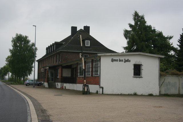 Zollmuseum Friedrichs in Aachen-Horbach, 11 km from Aachen, Deutschland (Zone 32).